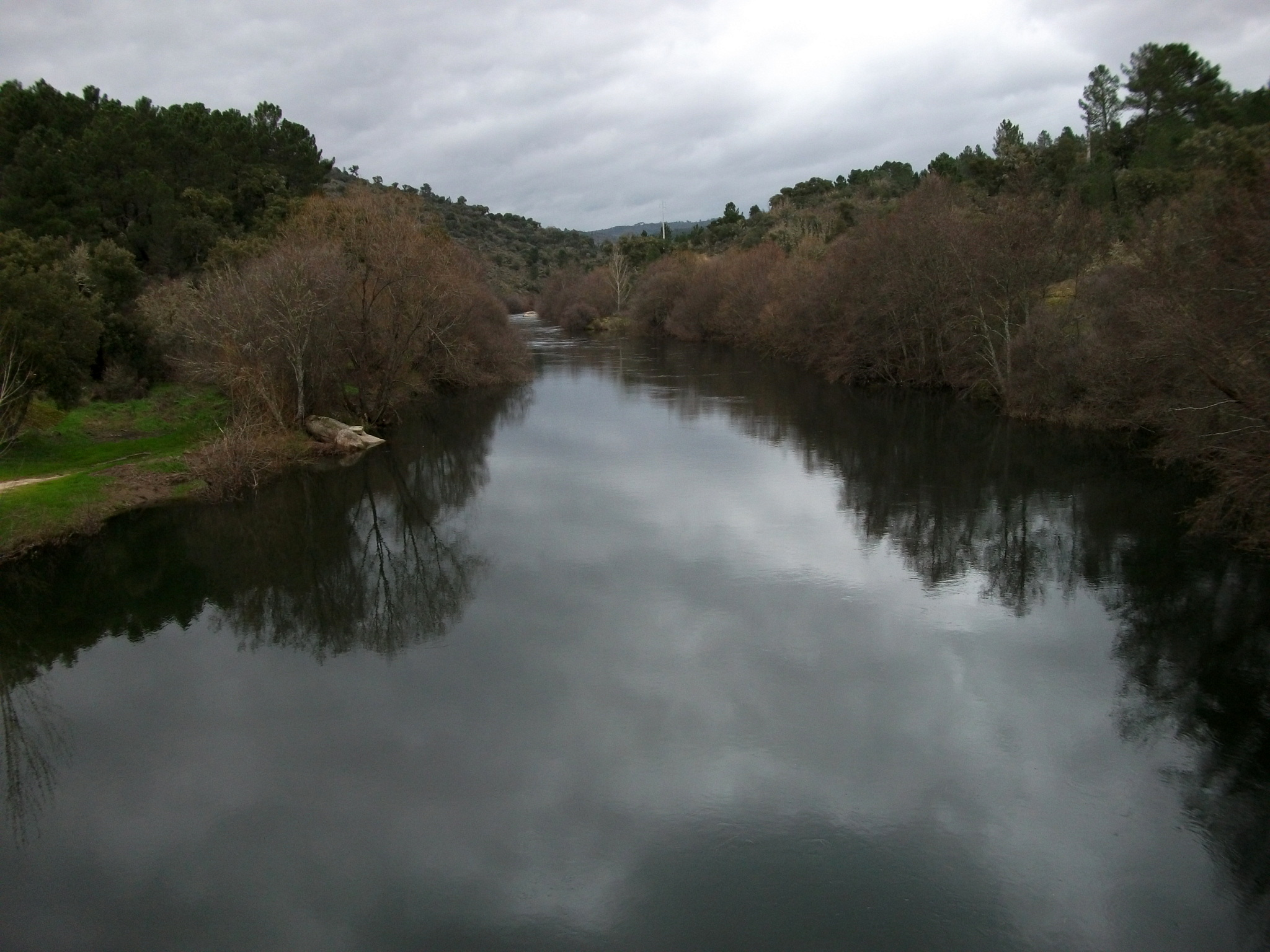 Rio Tuela a montante da "Ponte de pedra sobre o rio Tuela", também referida como "Ponte Românica sobre o rio Tuela" ou "Ponte de Torre de Dona Chama", na Estrada Nacional 206 em Torre de Dona Chama, Portugal.